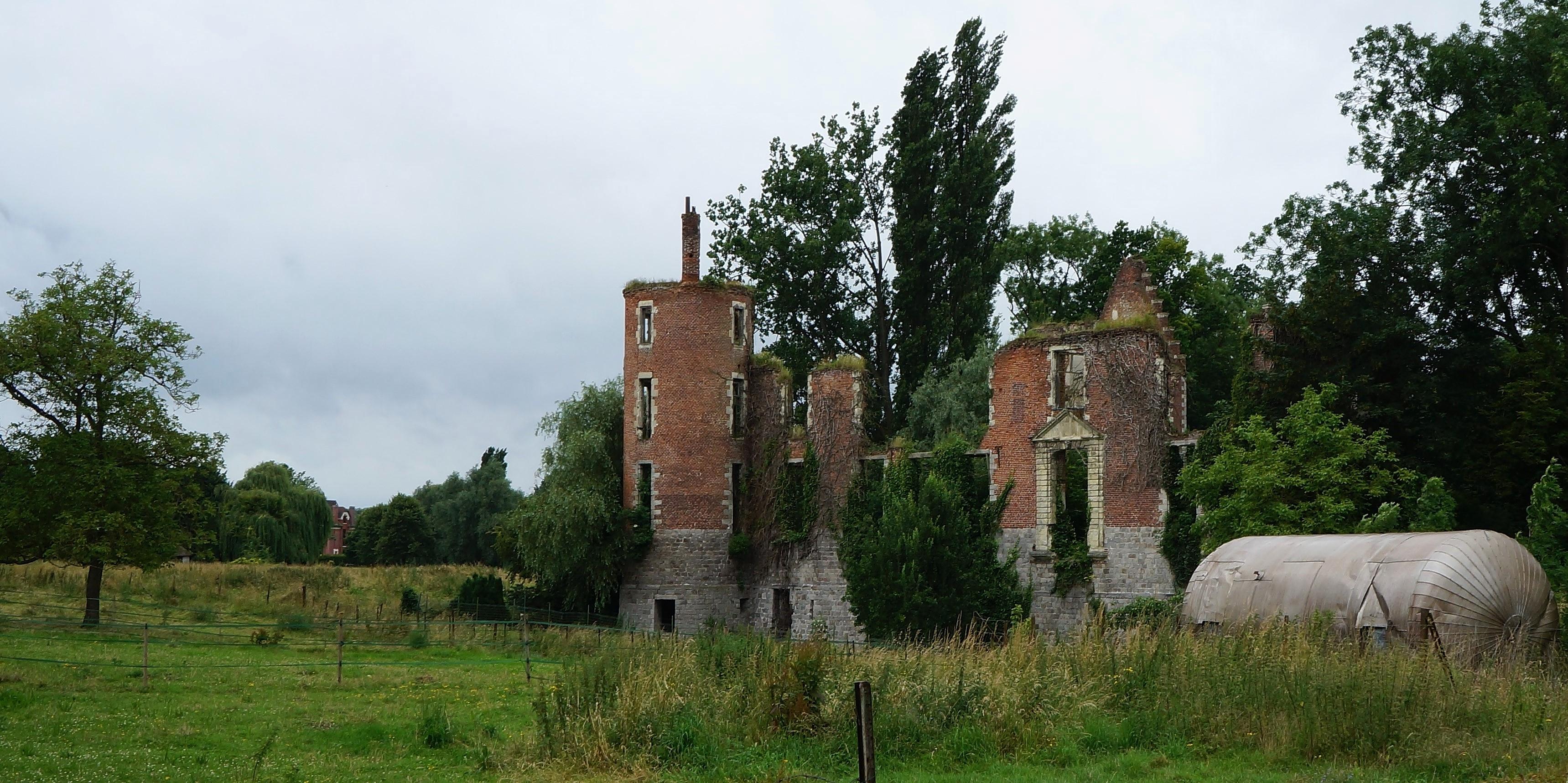 Château de Gœulzin Nord.